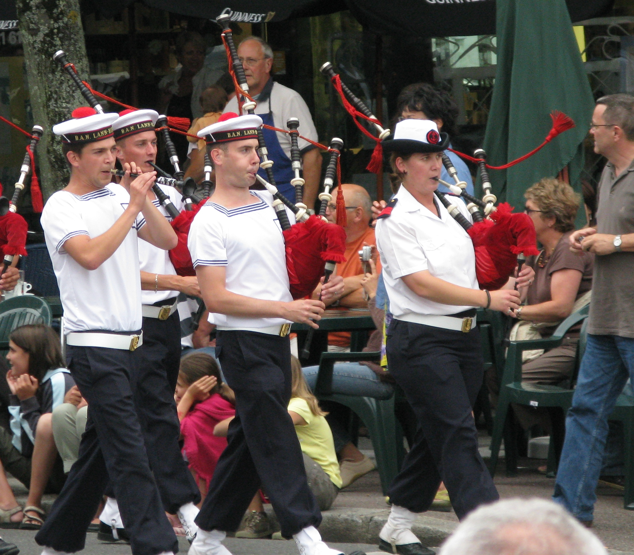 Bagad de Lann-Bihoué pendant le Festival interceltique de Lorient